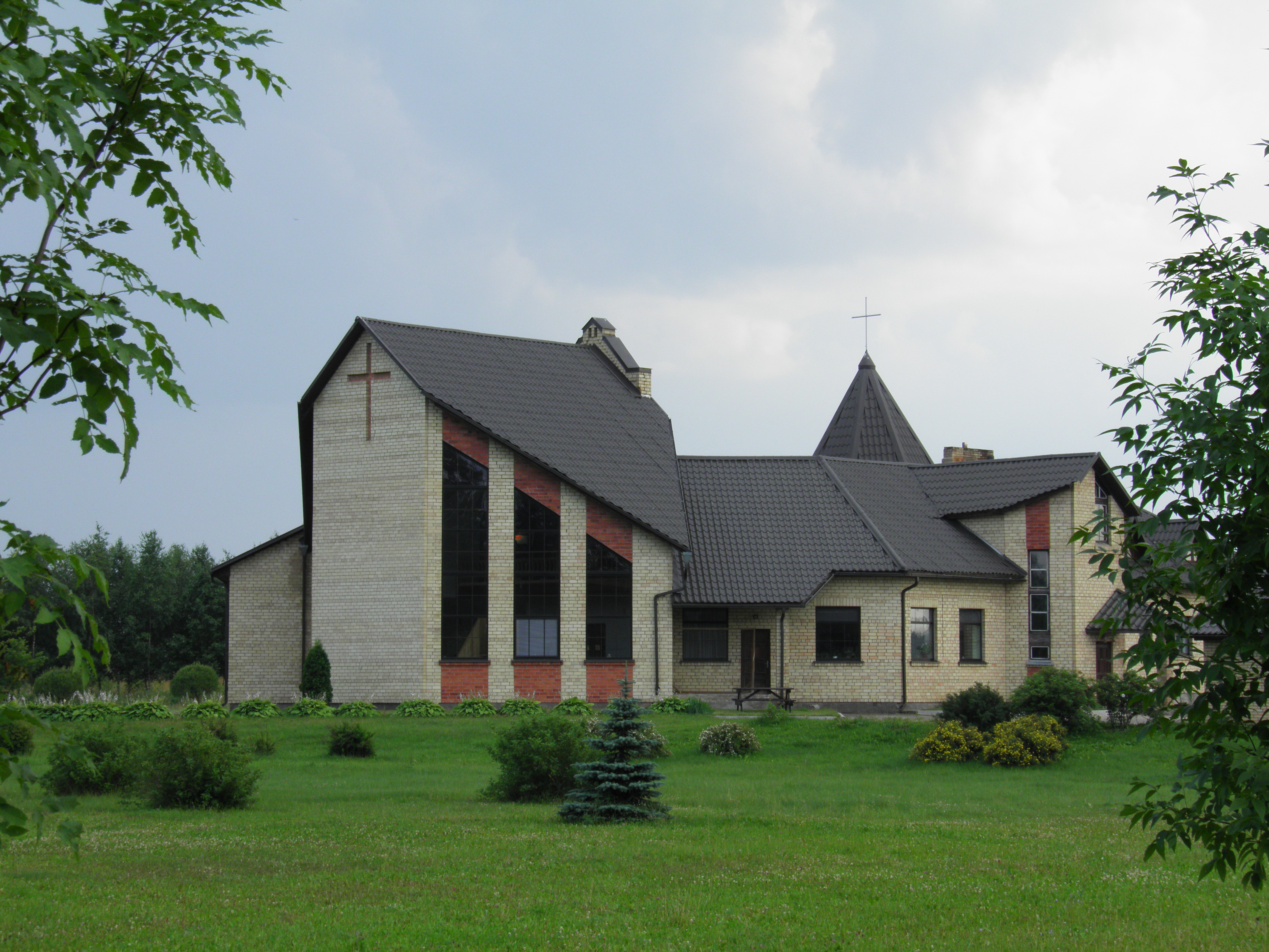 Aizkraukles luterāņu baznīca